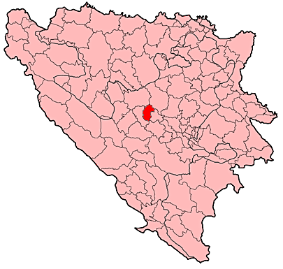 Prikaz općine Vitez u Bosni i Hercegovini